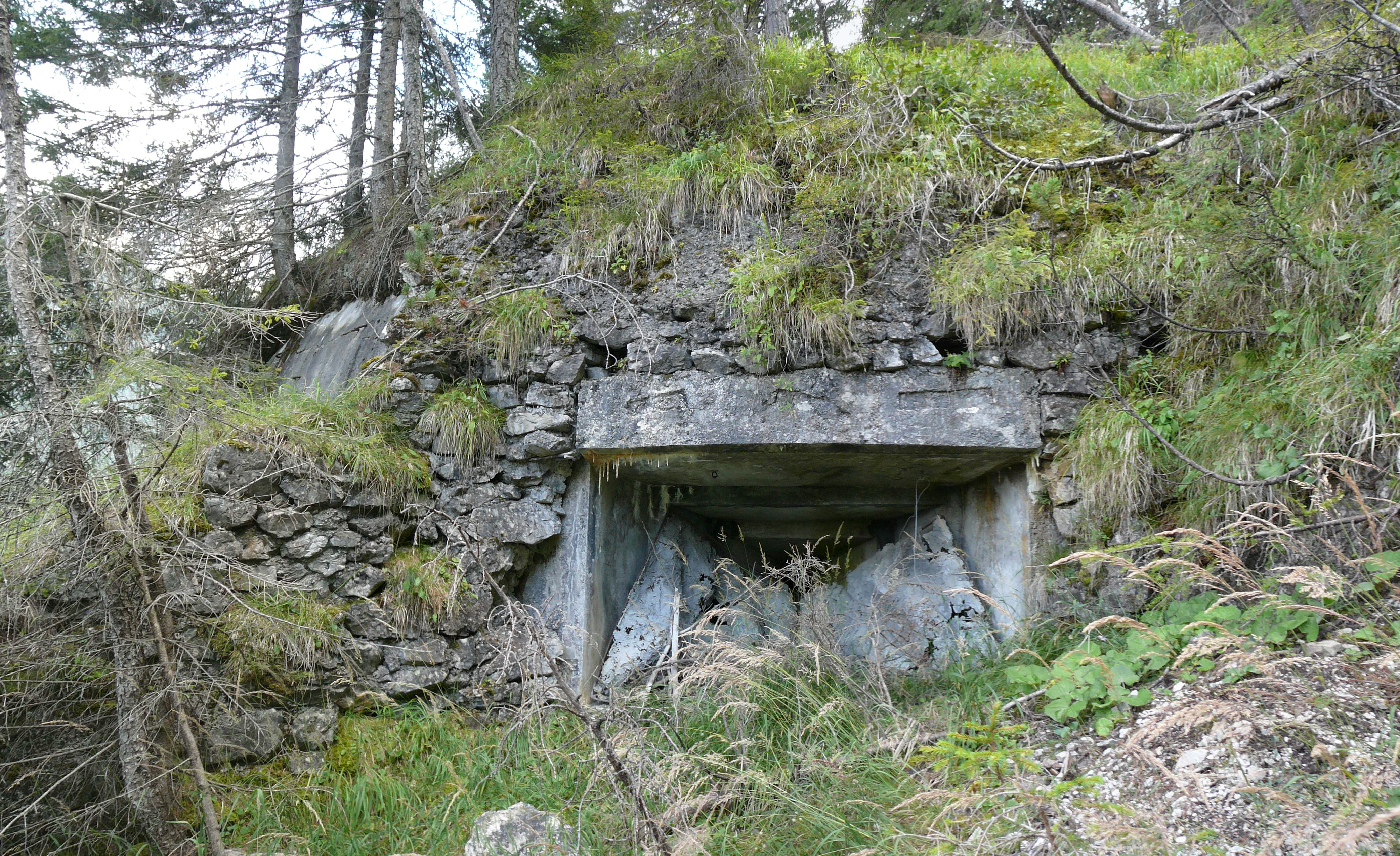 Opera 1b.1 LandroNord